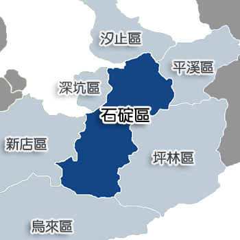 石碇區相對位置。